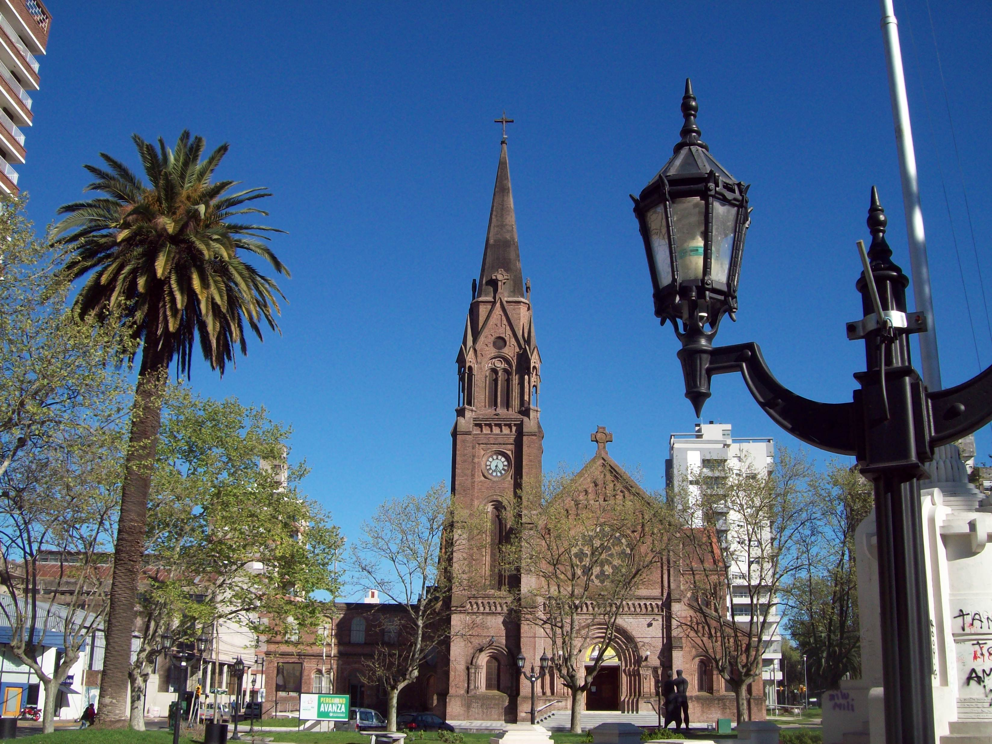 Parroquia Ntra. Sra. de la Merced. Pergamino, Argentina.